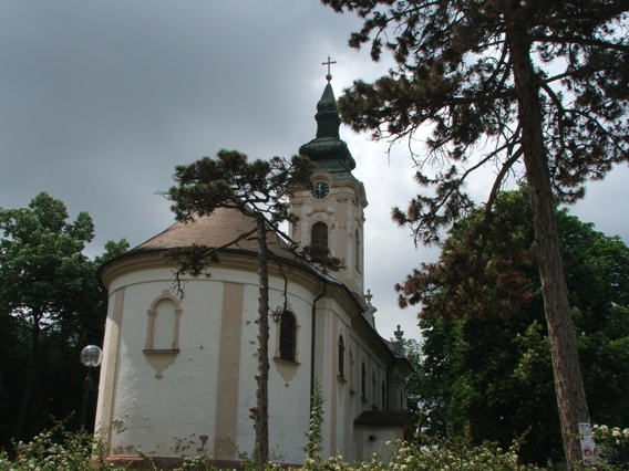 The Orthodox Church St. Nikola in Kikinda, Vojvodina (Serbia)/L'église orthodoxe Saint-Nicolas de Kikinda en Voïvodine (Serbie)